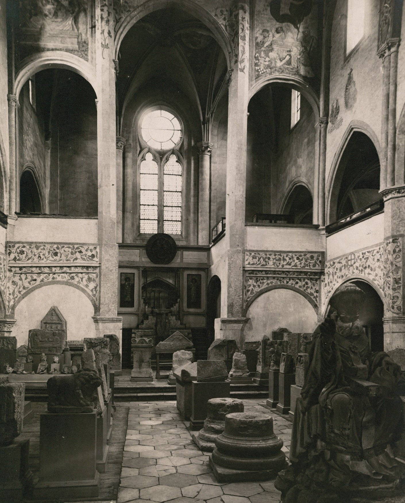 Photo - Regensburg - St. Ulrich - römische Fundstücke des Historischen Vereins